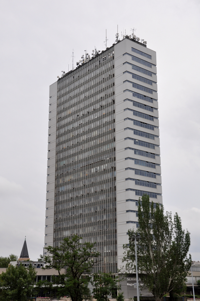 Semmelweis University tower, Nagyvárad square